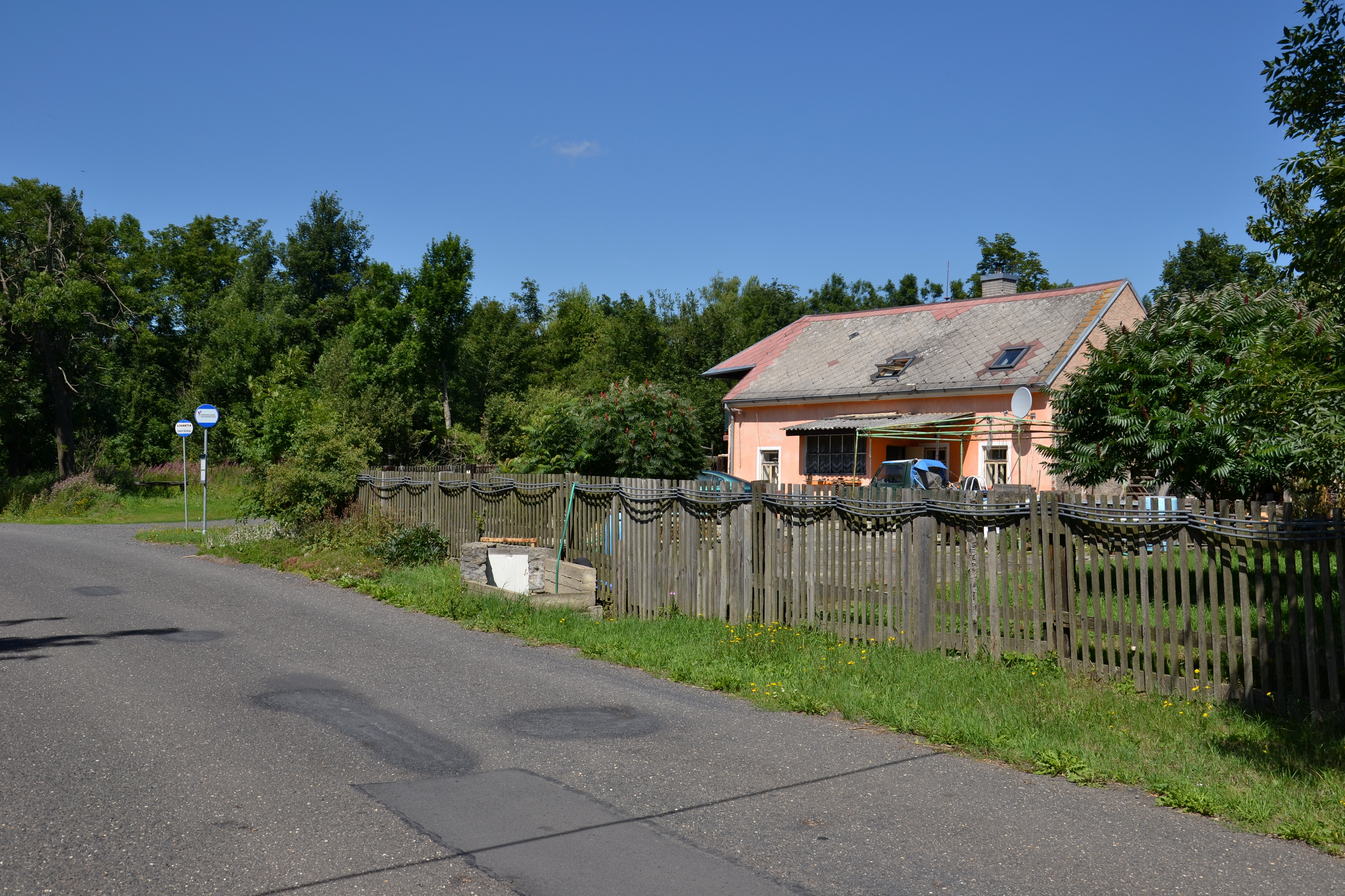 Javorná – jediný dochovaný dům